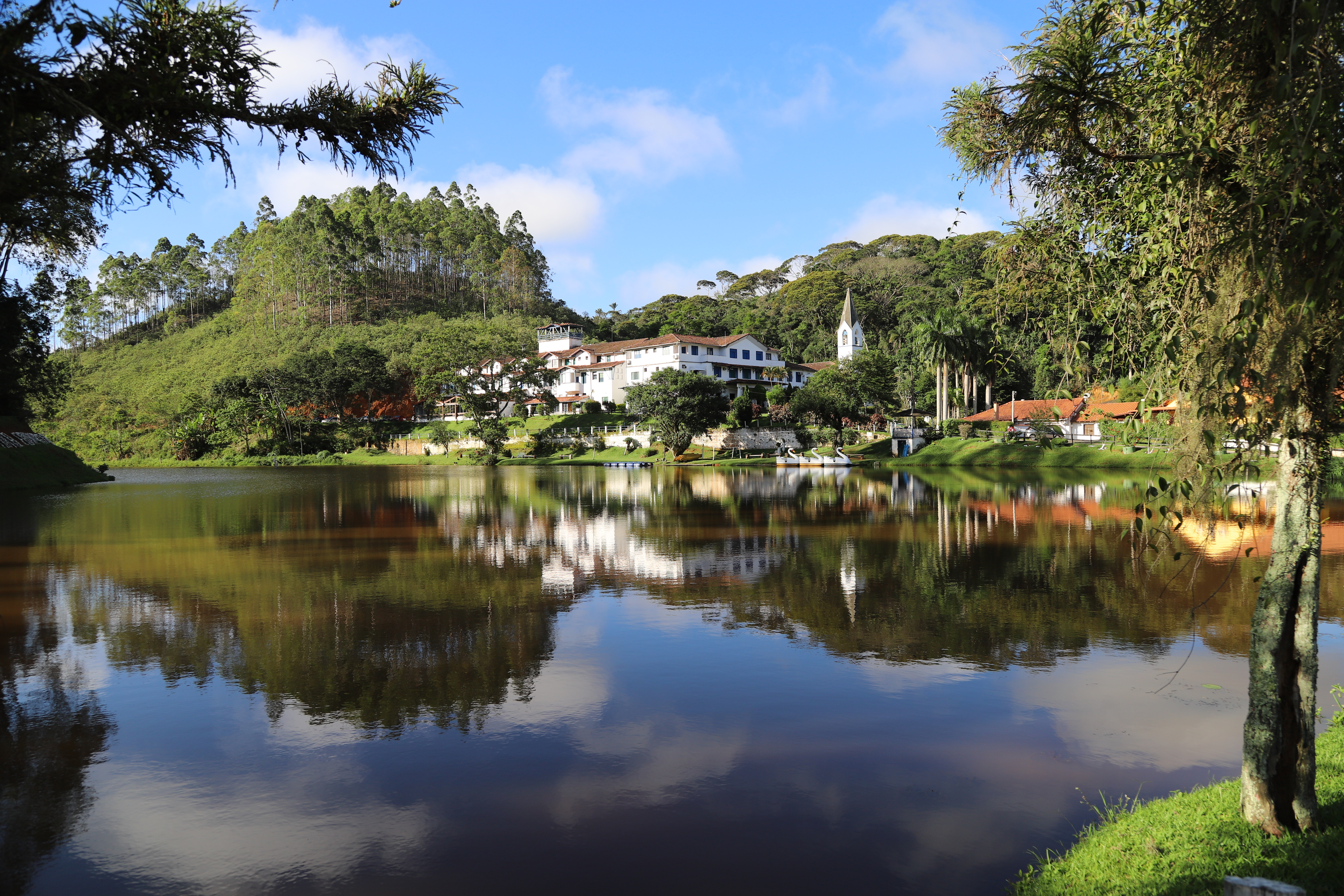 Fotografia do Hotel Fazenda Santa Bárbara, localizado na cidade de Engenheiro Paulo de Frontin - RJ.